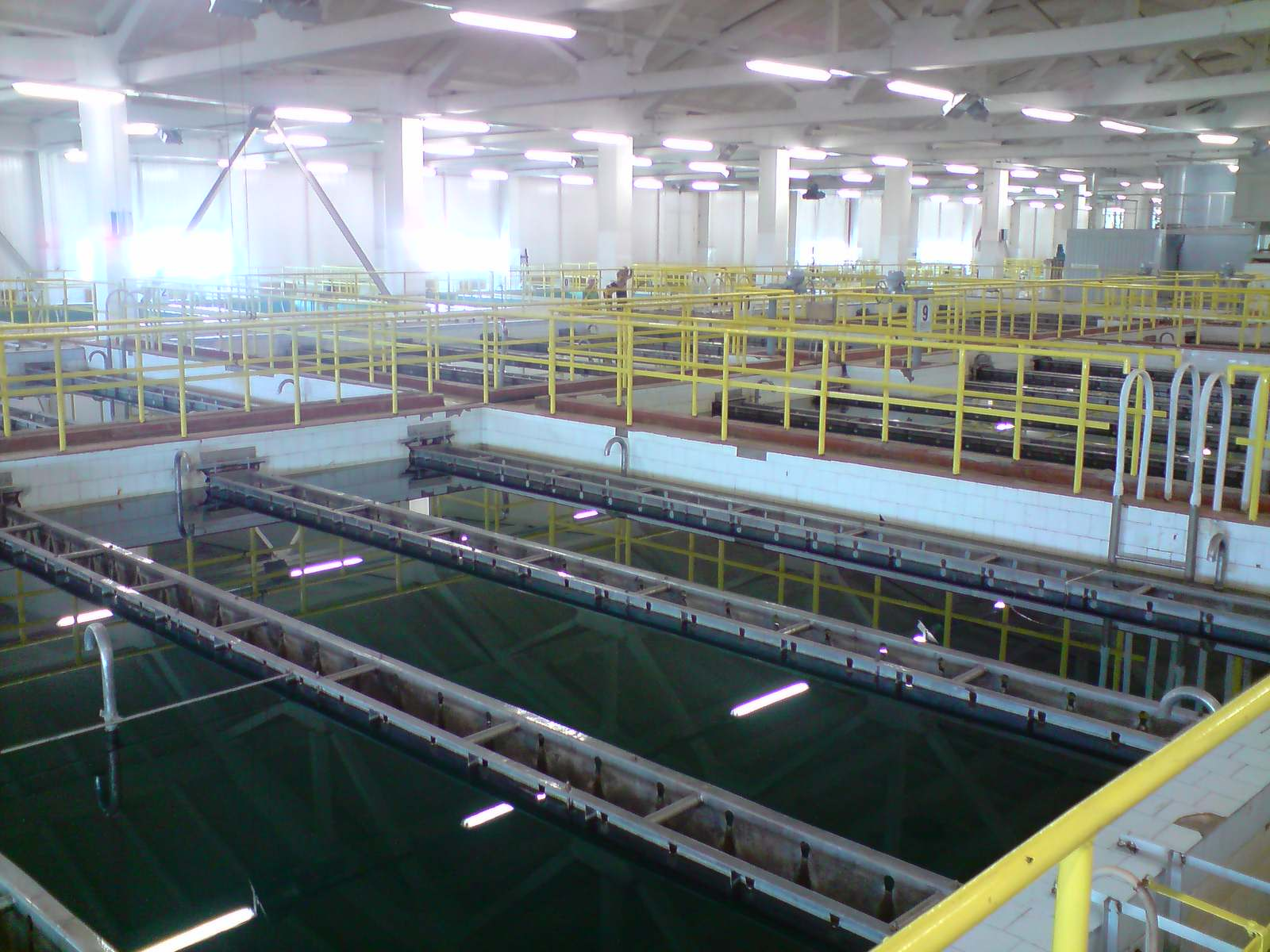 Tallinna veepuhastusjaam